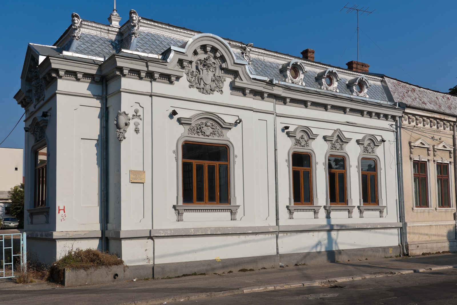 Fotografia prezinta casa Dimitrie Gh. Dima vazuta dinspre str. Sfanta Vineri.